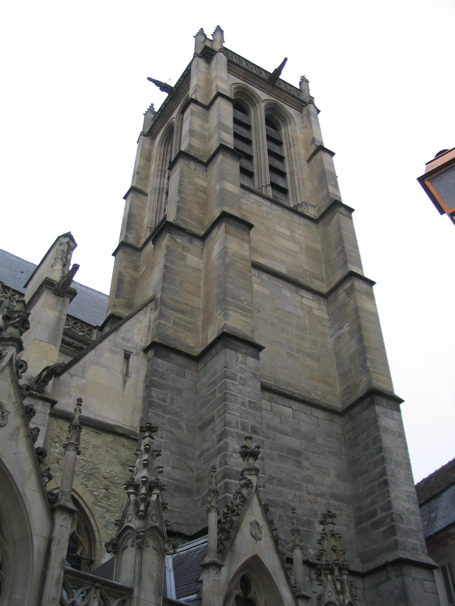 Clocher de l'église Saint Aspais à Melun, France. Auteur/Author/Autor:Tej